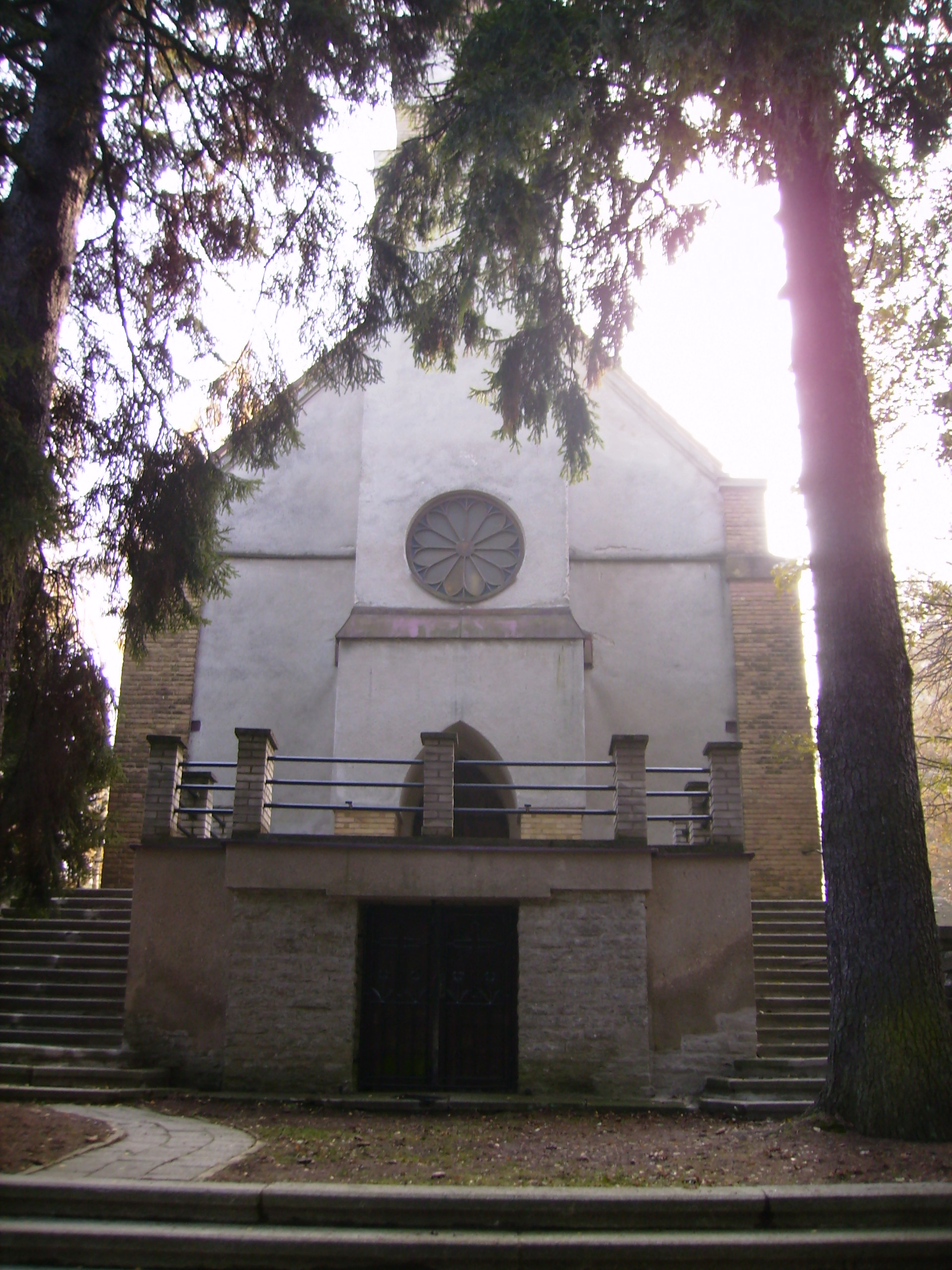 kostel zvenku